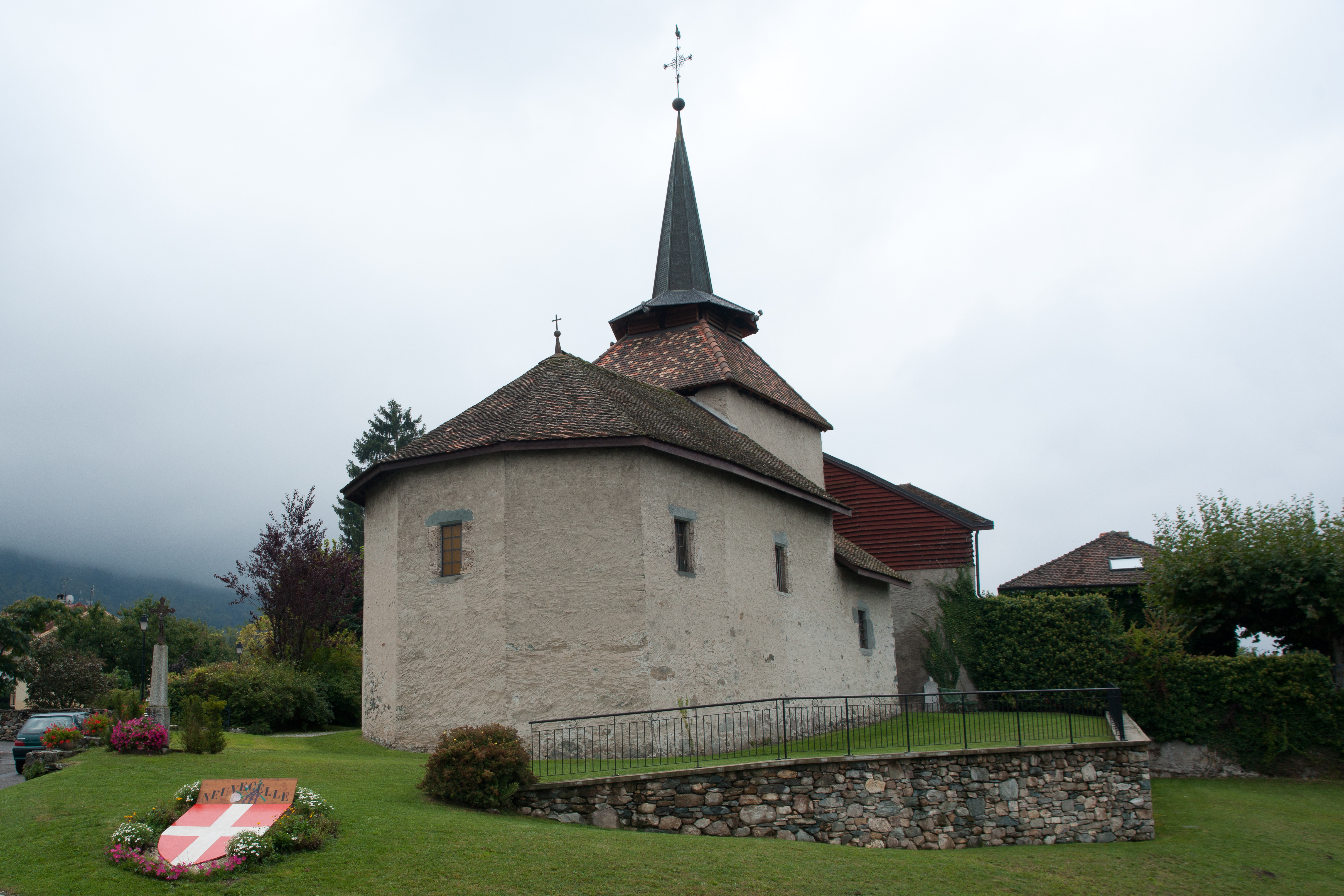 Chapelle de Maraiche à Neuvecelle .